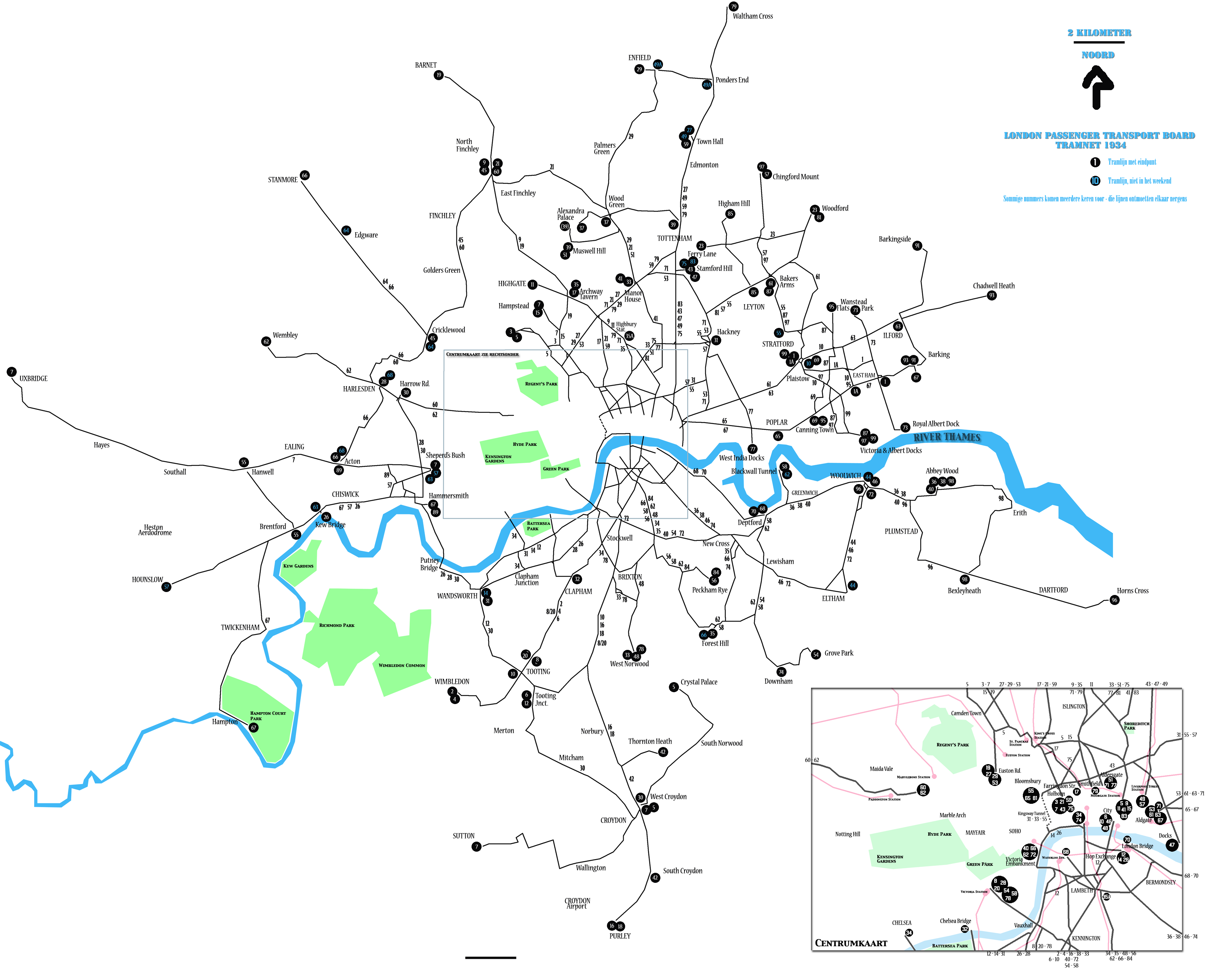 Grafische weergave tramnet London in 1934